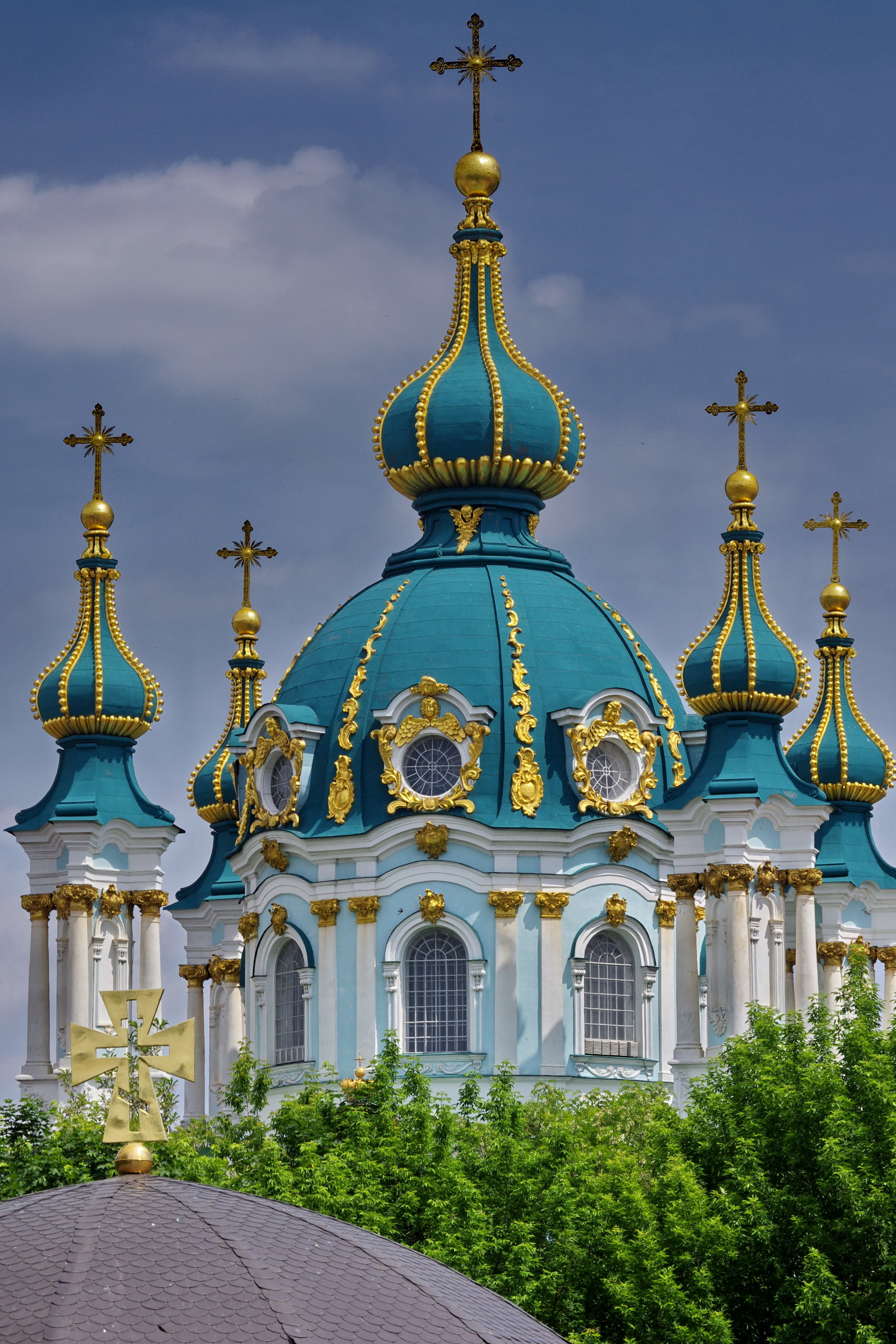 St'Andrei church